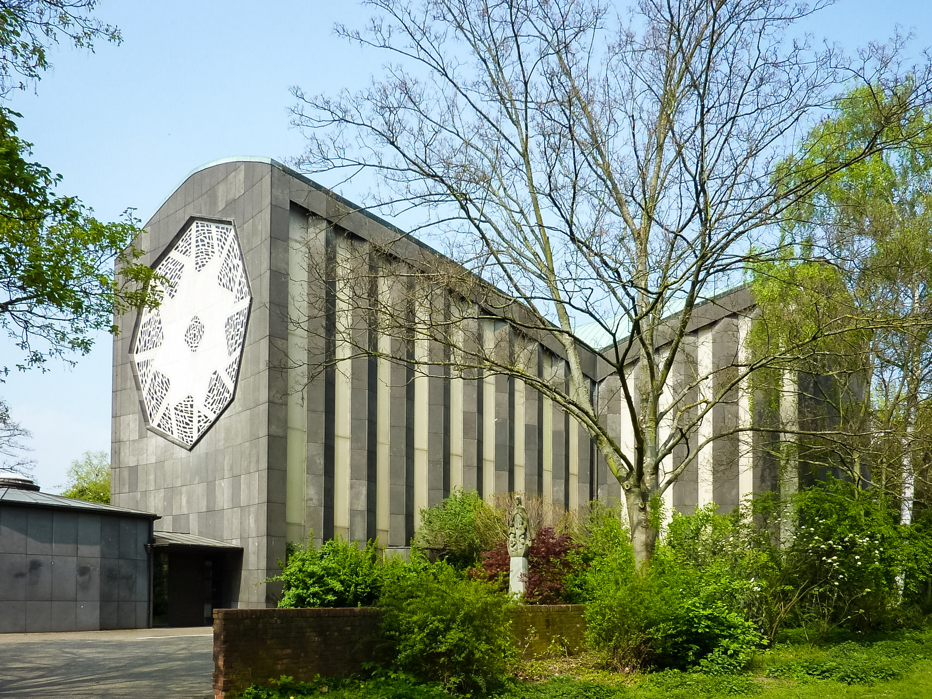 Kirche Christi Verklärung (Köln-Heimersdorf)